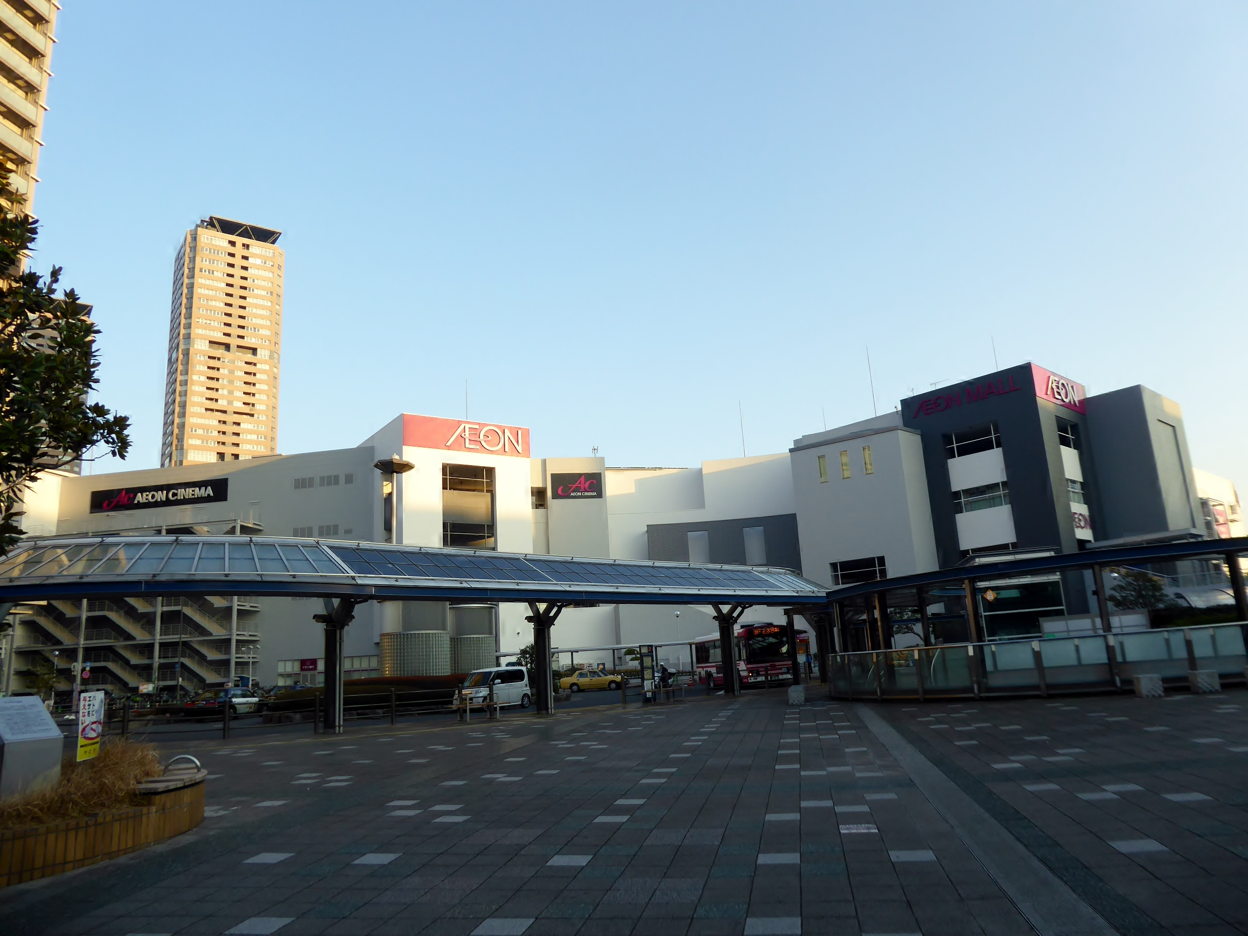 イオンモール大日ウエスト棟を撮影。